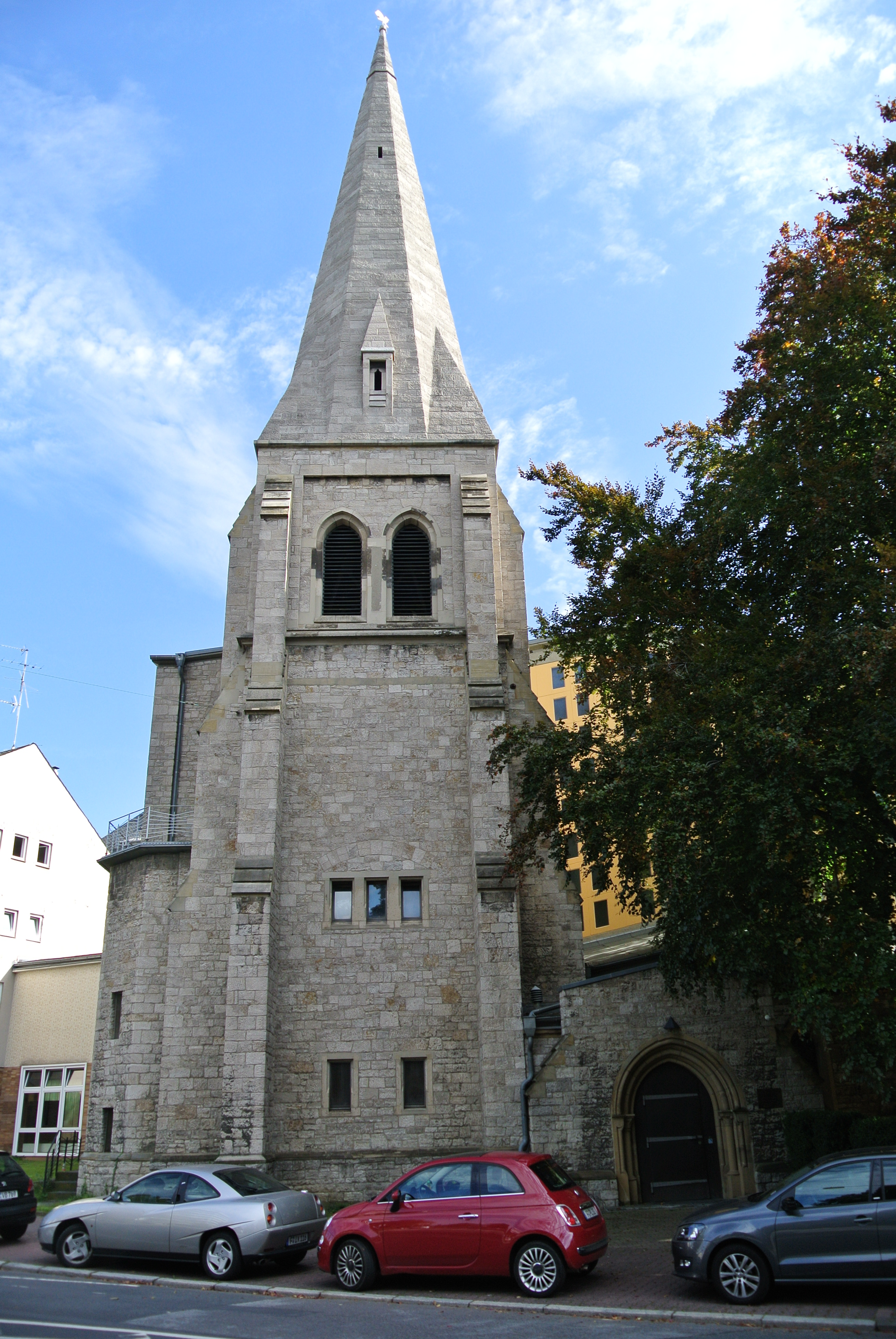 Epiphaniaskirche von Westen, eine Kirche aus den 1950er Jahren des Architekten Karl Wimmenauer unter Verwendung der Ruine der Immanuelkirche von 1903